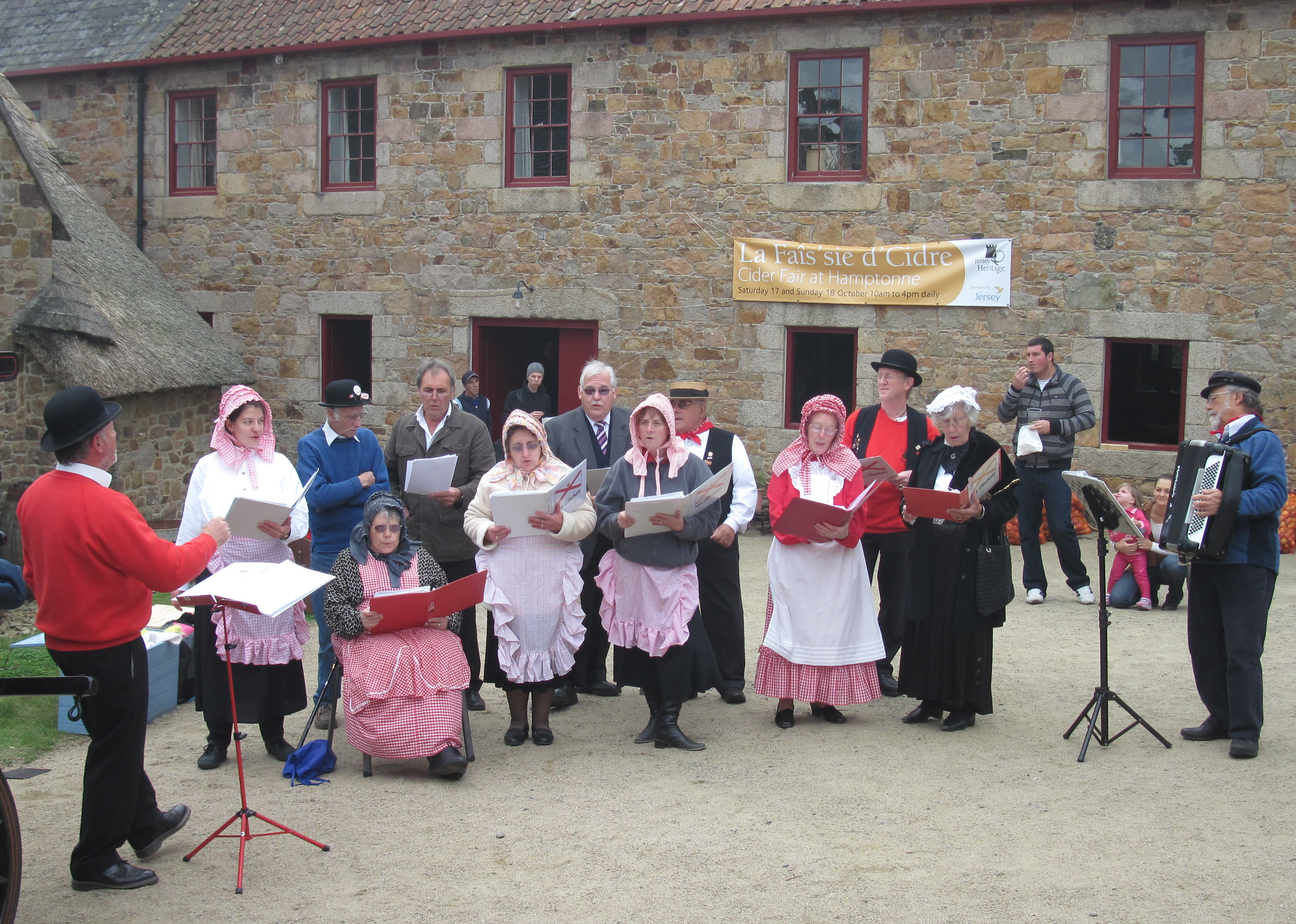 Nrf: Faîs'sie d'Cidre, 17-18 d'Octobre 2009, Jèrri